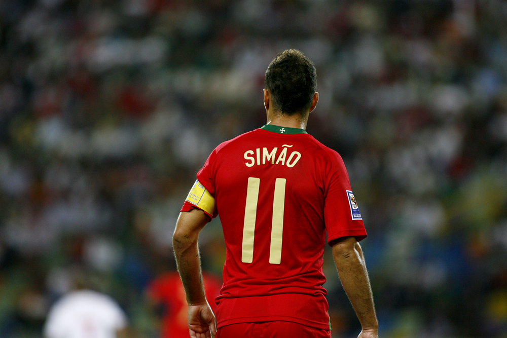 Simão (11); Portugal 2-3 Denmark, Lisbon September 10 2008